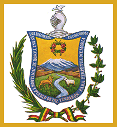 Escudo de Armas de la Ciudad de La Paz